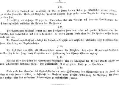 Zweite Seite der Satung des Afrika-Vereins deutscher Katholiken